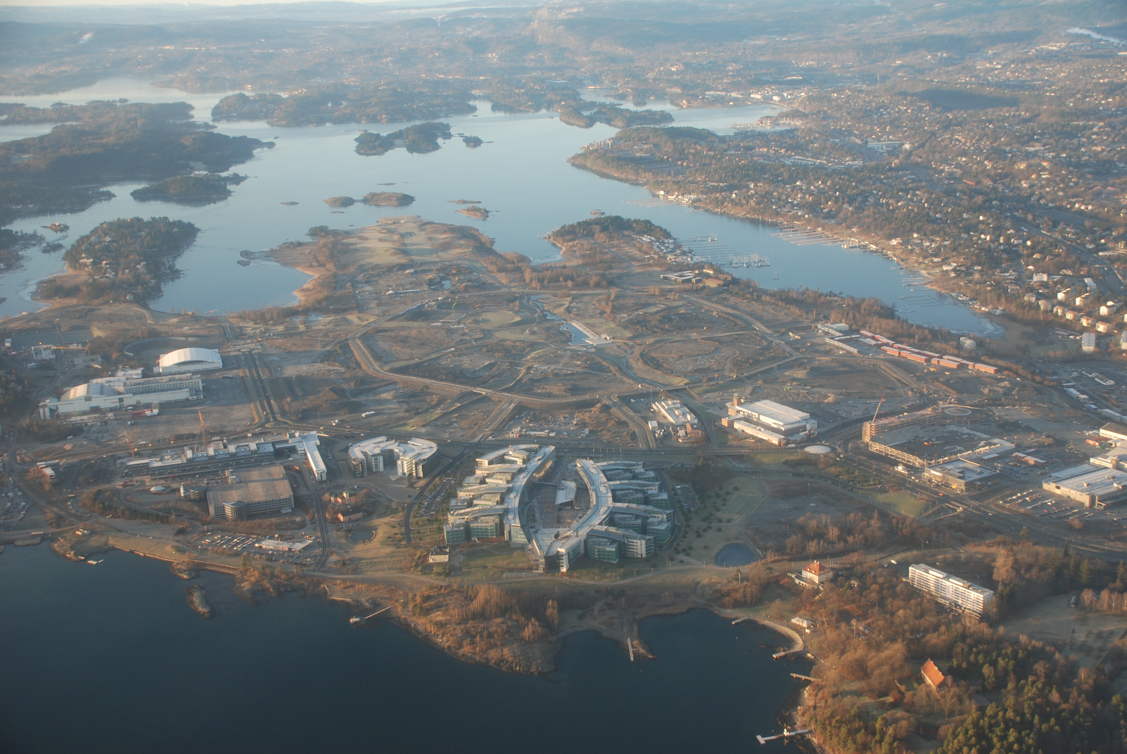 Fornebu, Oslo from air.